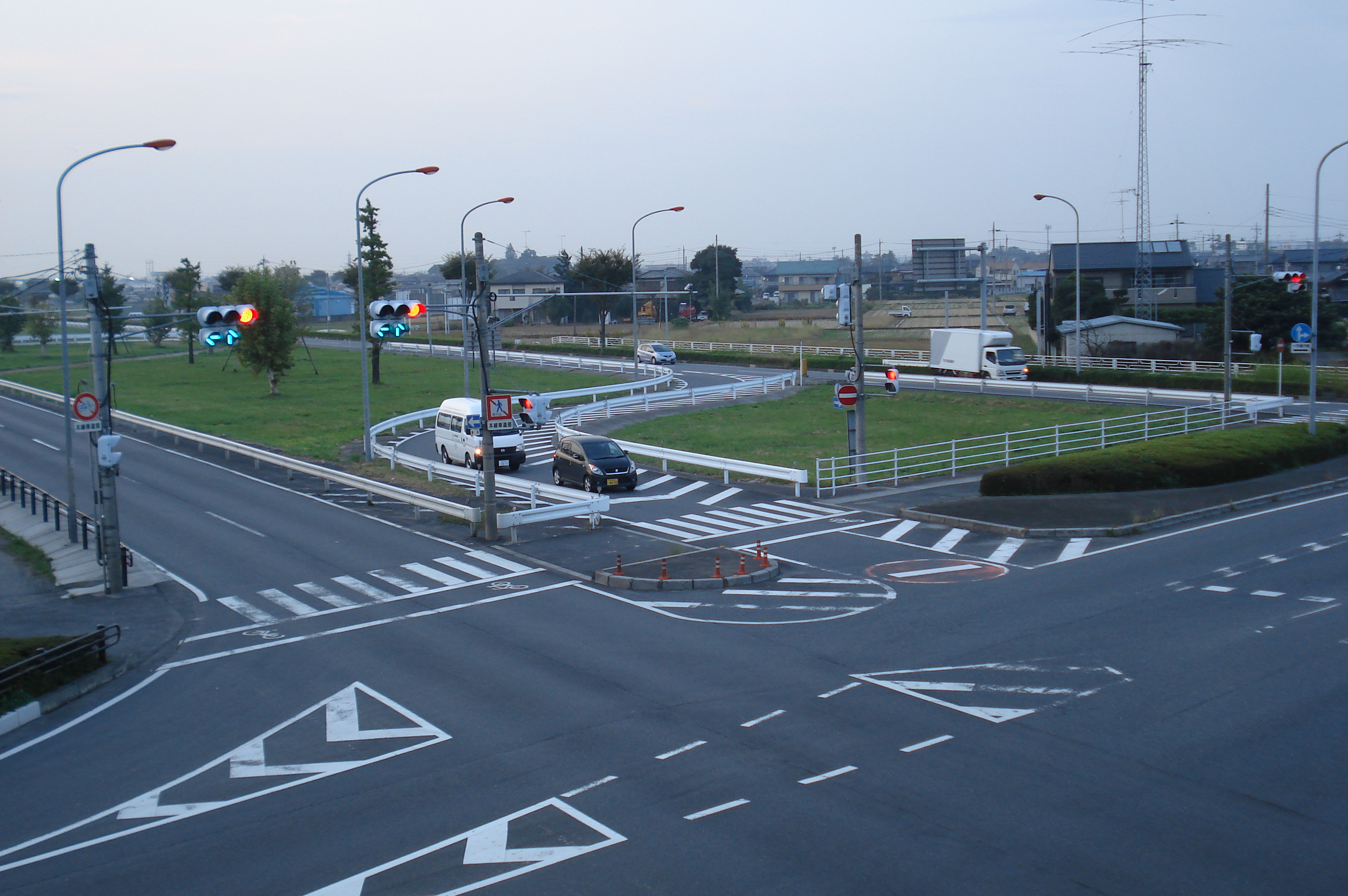 国道17号 熊谷バイパス 埼玉県行田市 下忍交差点